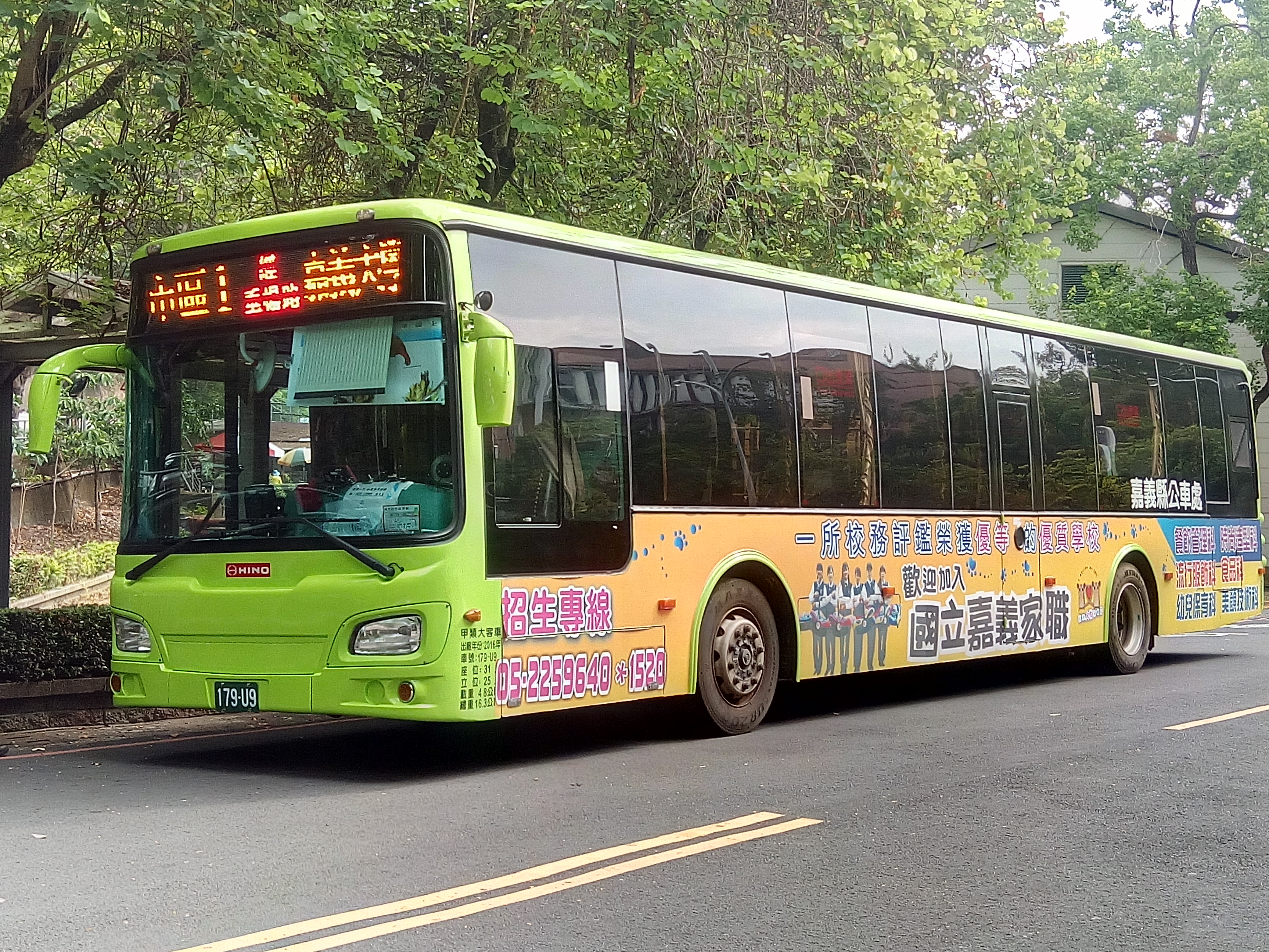 嘉義市バス市区1系統 日野HS8Jバス179-U9